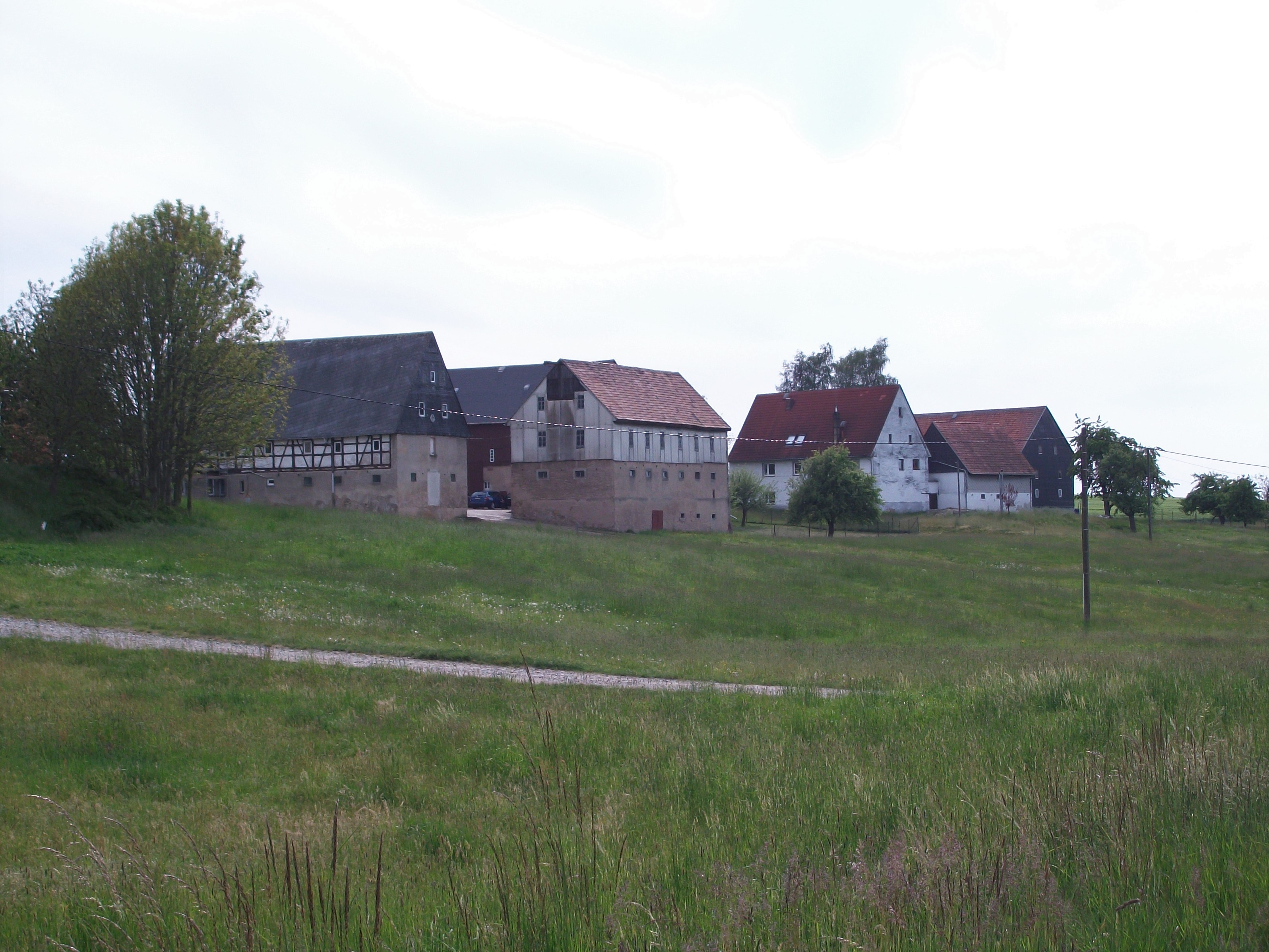 Seitenhain, oberer Ortsteil